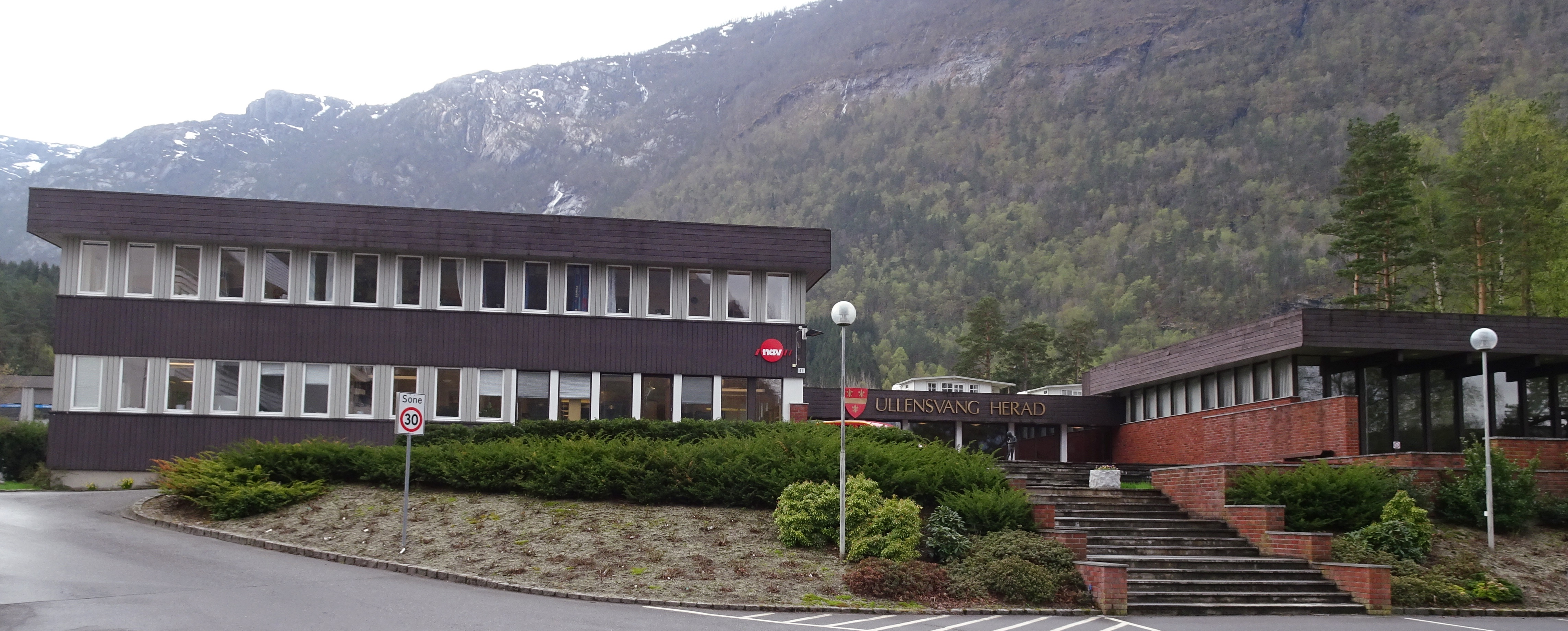 Kommunehuset for Ullensvang i Kinsarvik